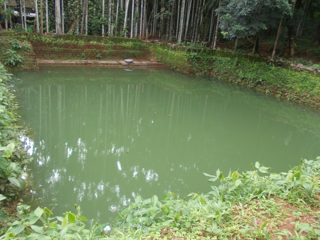 പള്ളിക്ക് സമീപത്തെ കുളം